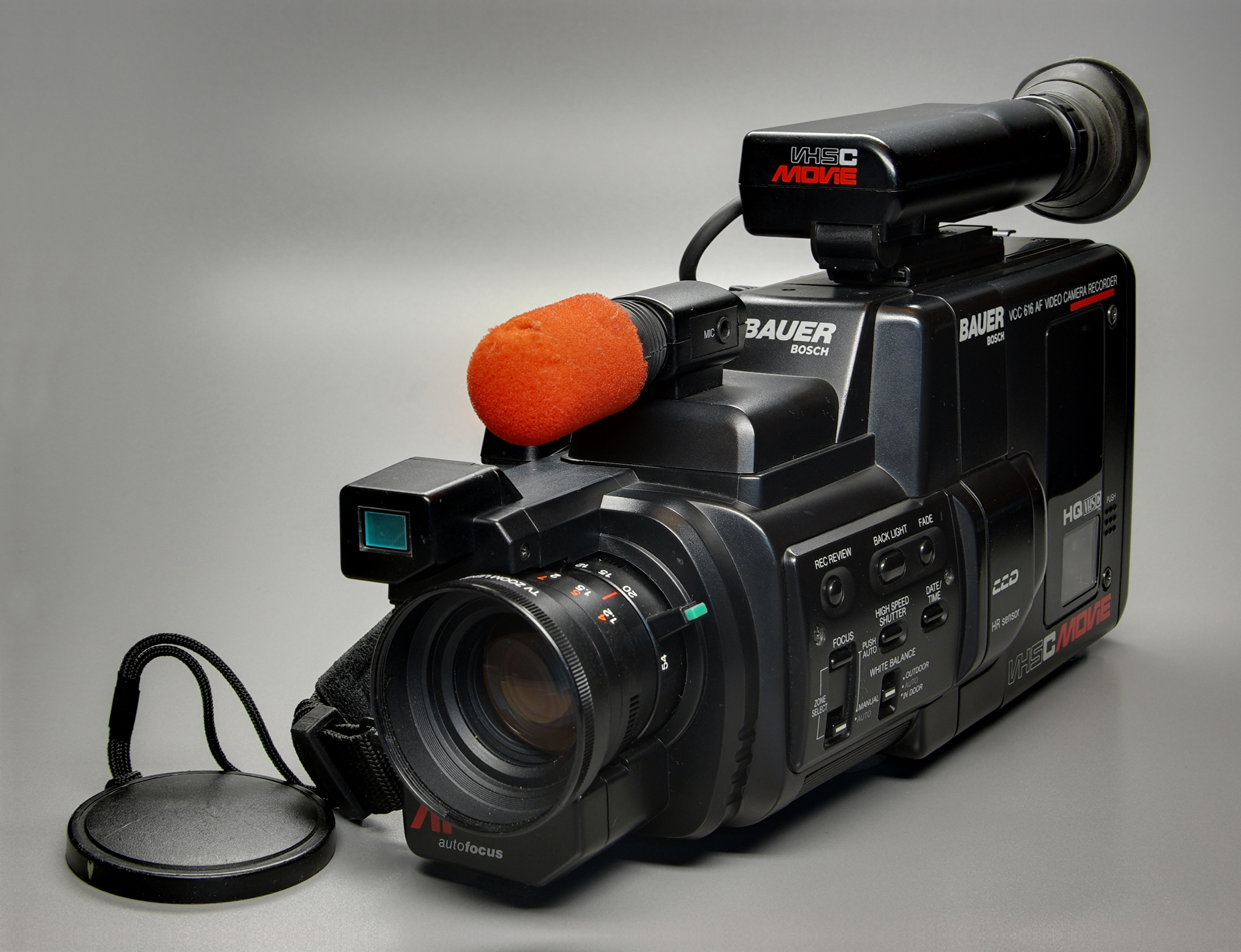 Bauer Bosch VCC 616 AF Video Camera Recorder. Aus insgesamt 9 Bildern durch Überlagerung entstanden. (3 Belichtung x 3 Focus)